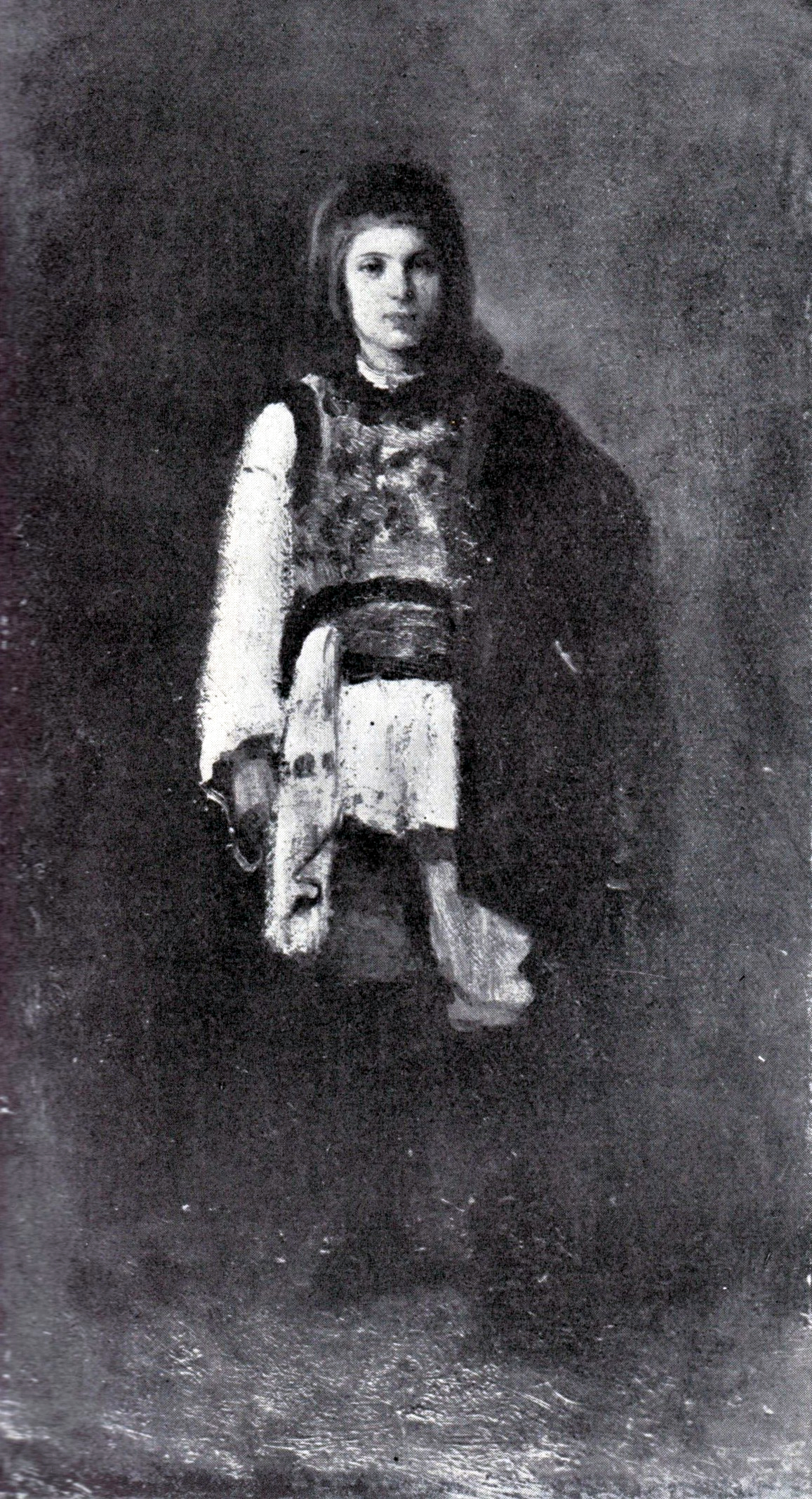 Alexandru Davila, copil, ulei/lemn, 45x24cm, semnat dreapta jos cu roșu - Colecție particulară